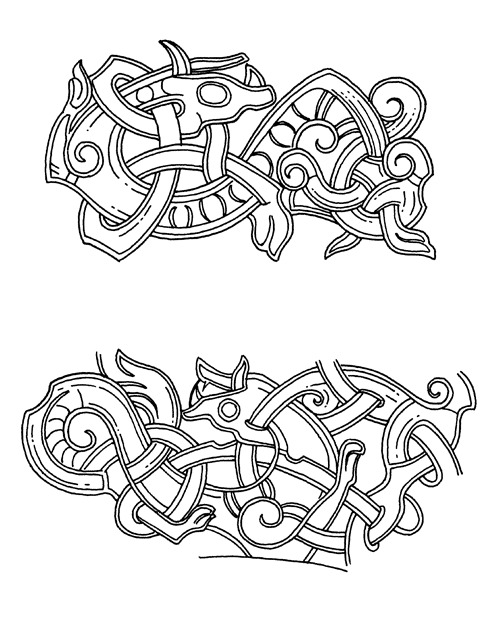 Motive von der Silberspange von Skaill. Jellingstil.